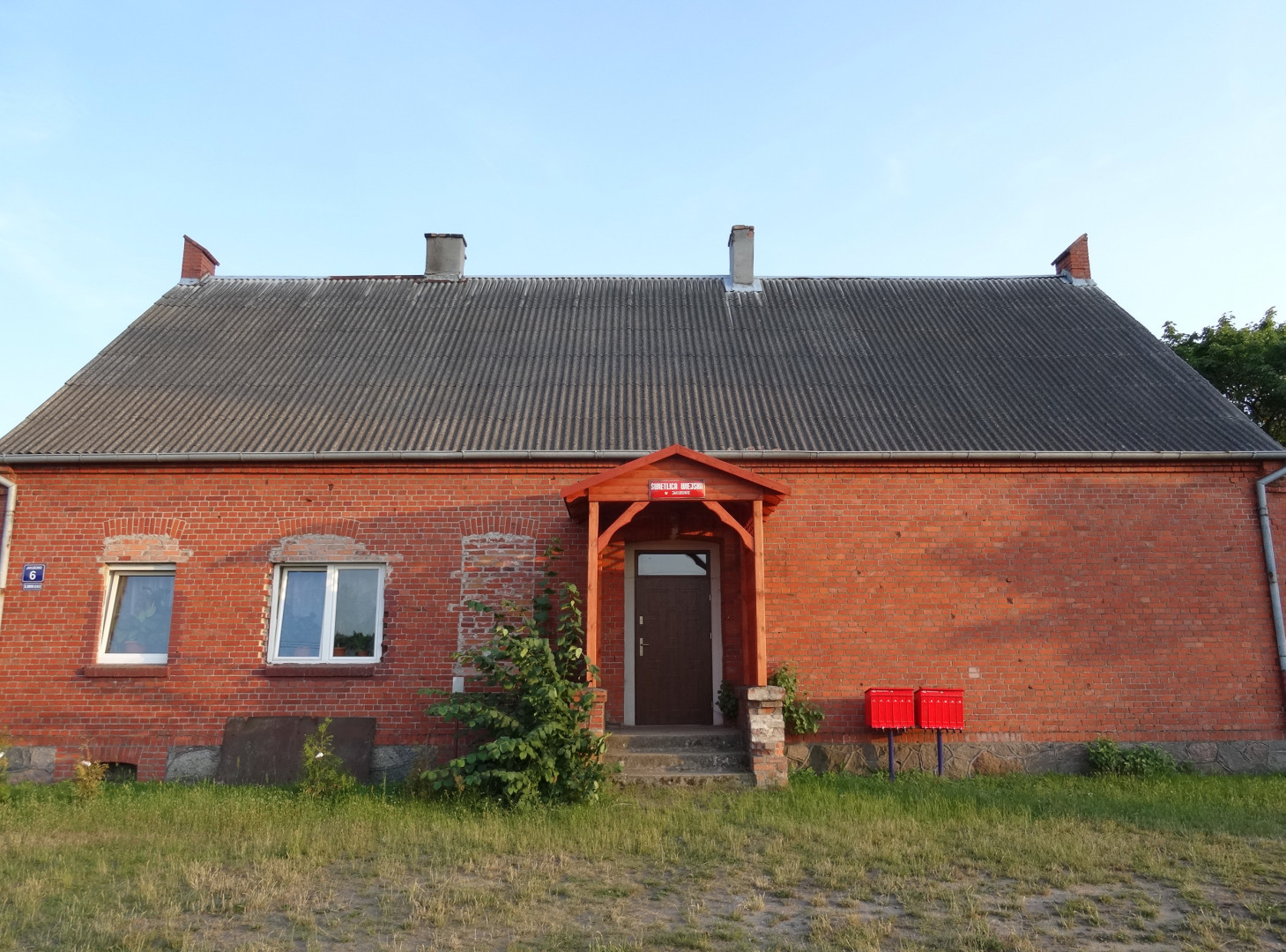 Jakubowo - świetlica wiejska, gmina Nowa Wieś Wielka, powiat bydgoski